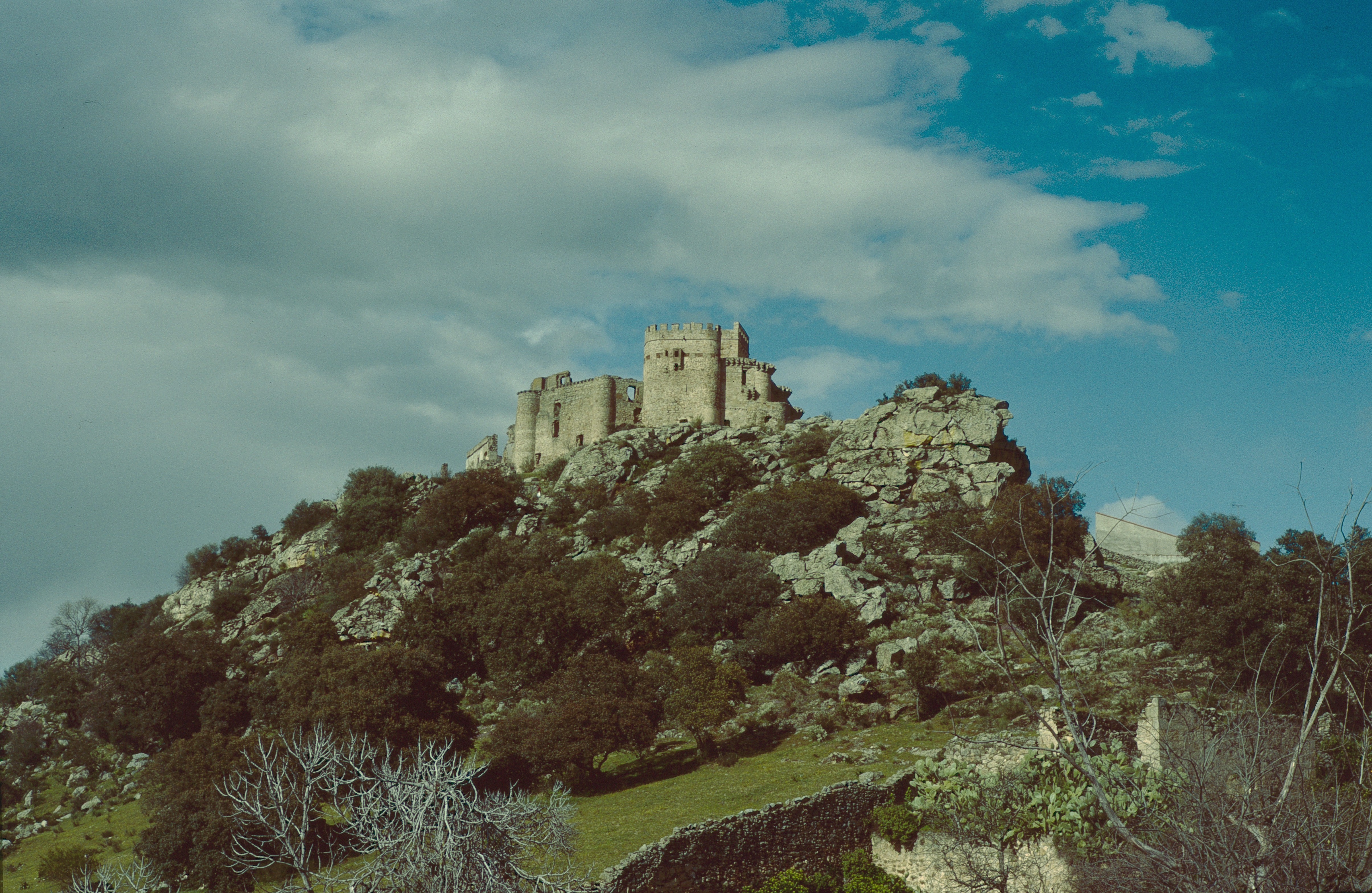 Belvis de Monroy